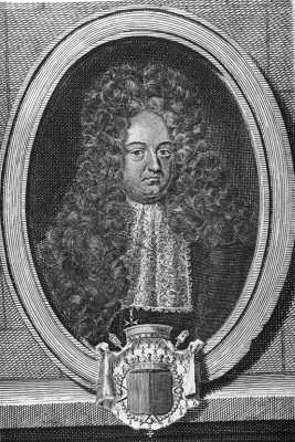 Wratislaw, Johann Wenzel Graf, * 25. 1. 1669 Prag (Tschechische Republik), † 21. 12. 1712 Wien, Diplomat.